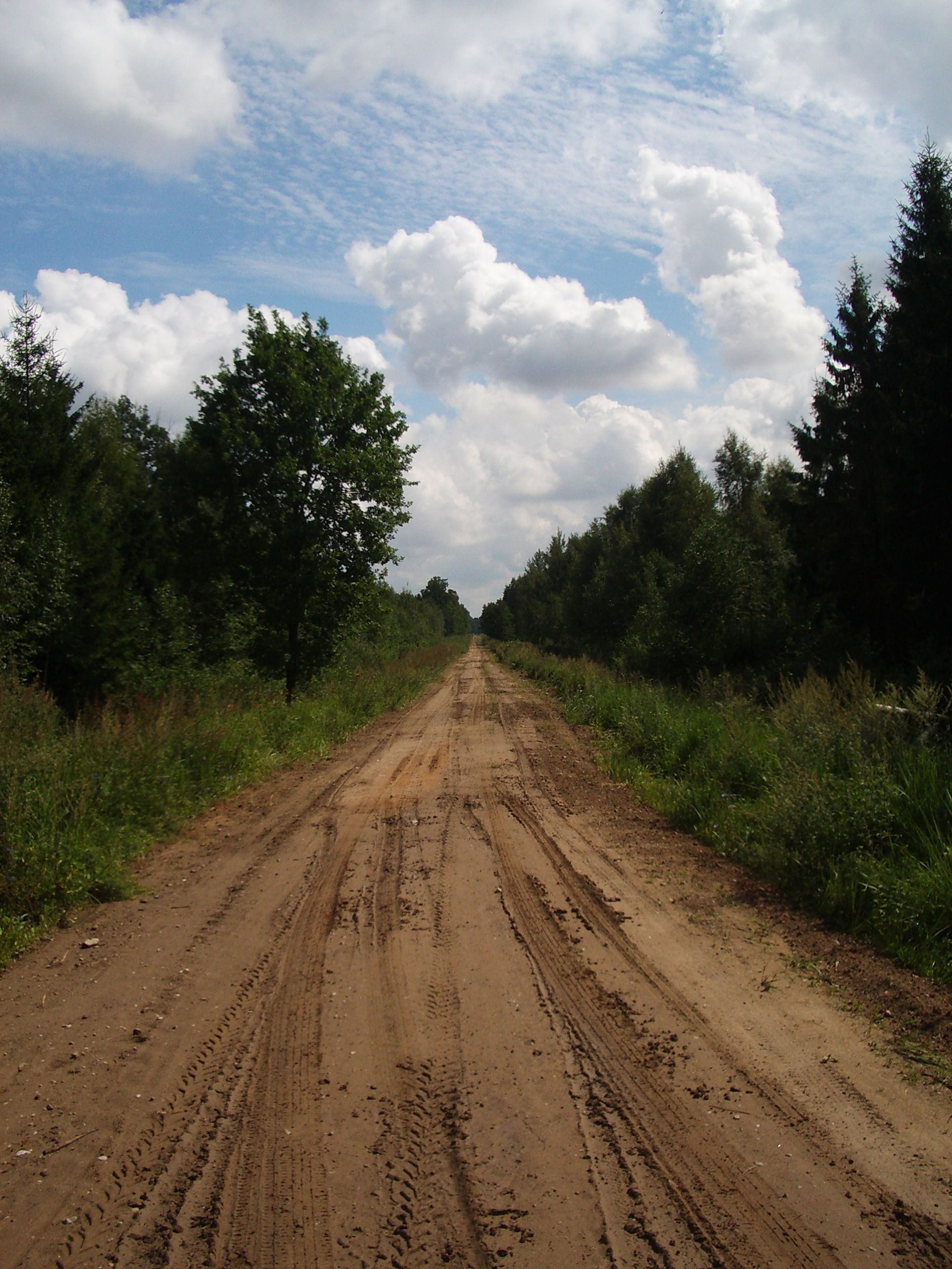 Paņemūnes forest